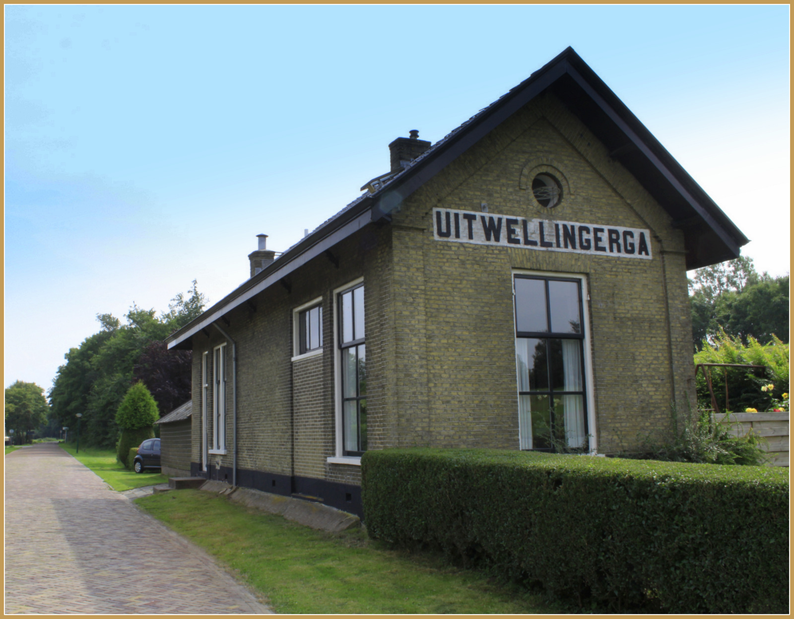 Uitwellingerga had ooit een tramstation, het gebouwtje staat er nog!